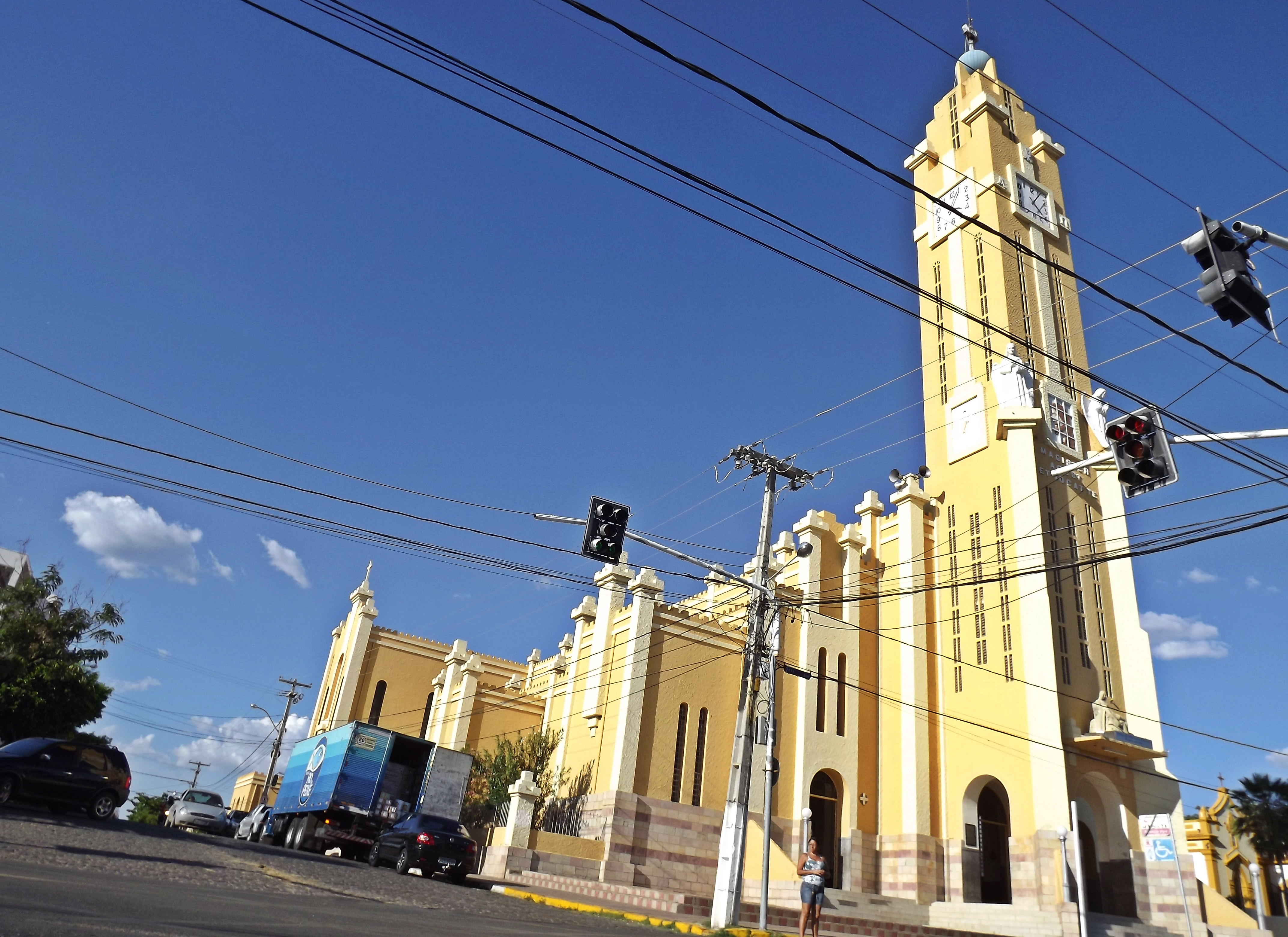 Catedral de Nossa Senhora da Piedade, sede da Diocese de Cajazeiras, estado da Paraíba, Brasil.